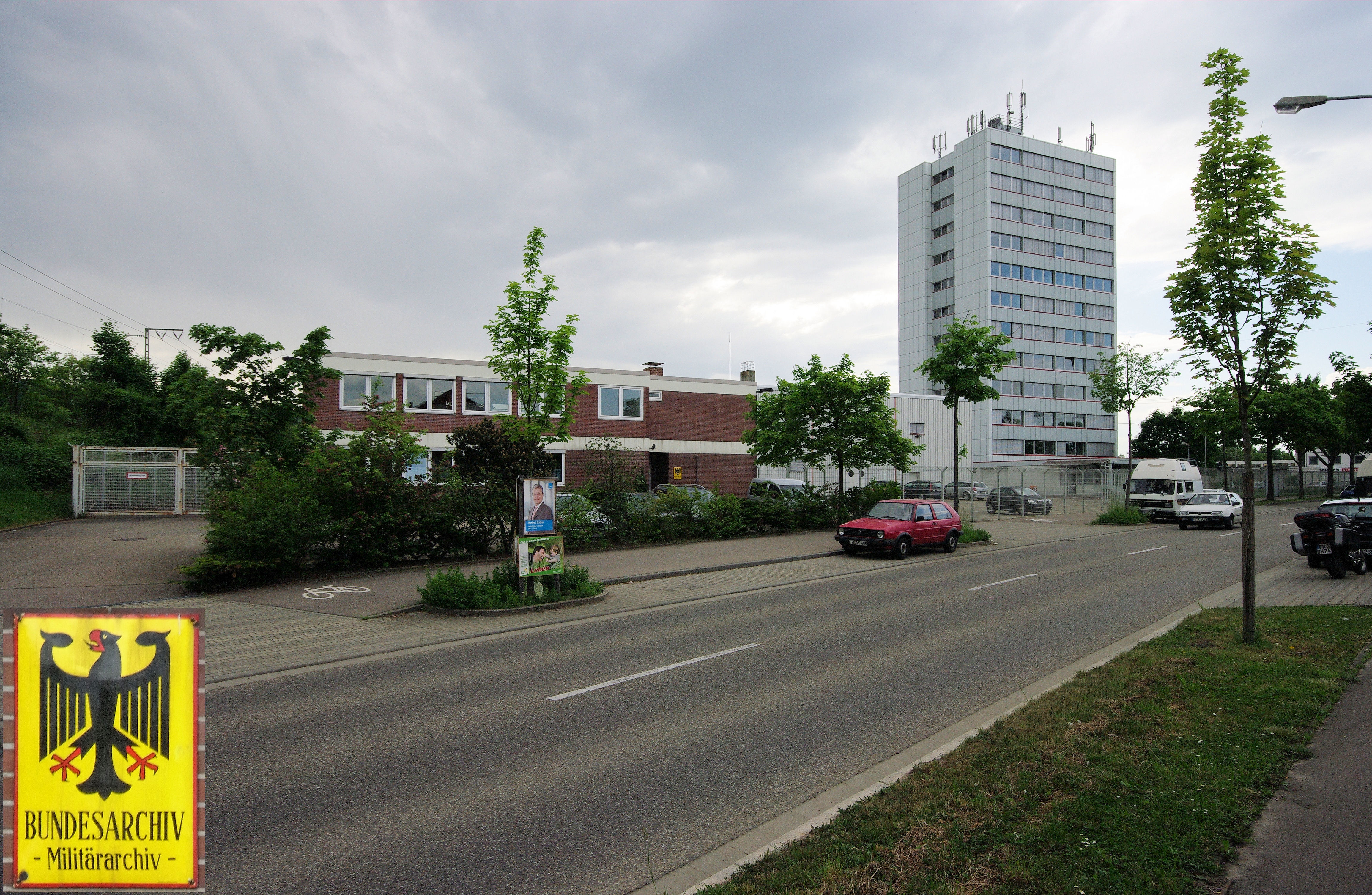 Bundesarchiv Miltärarchiv in Freiburg St. Georgen